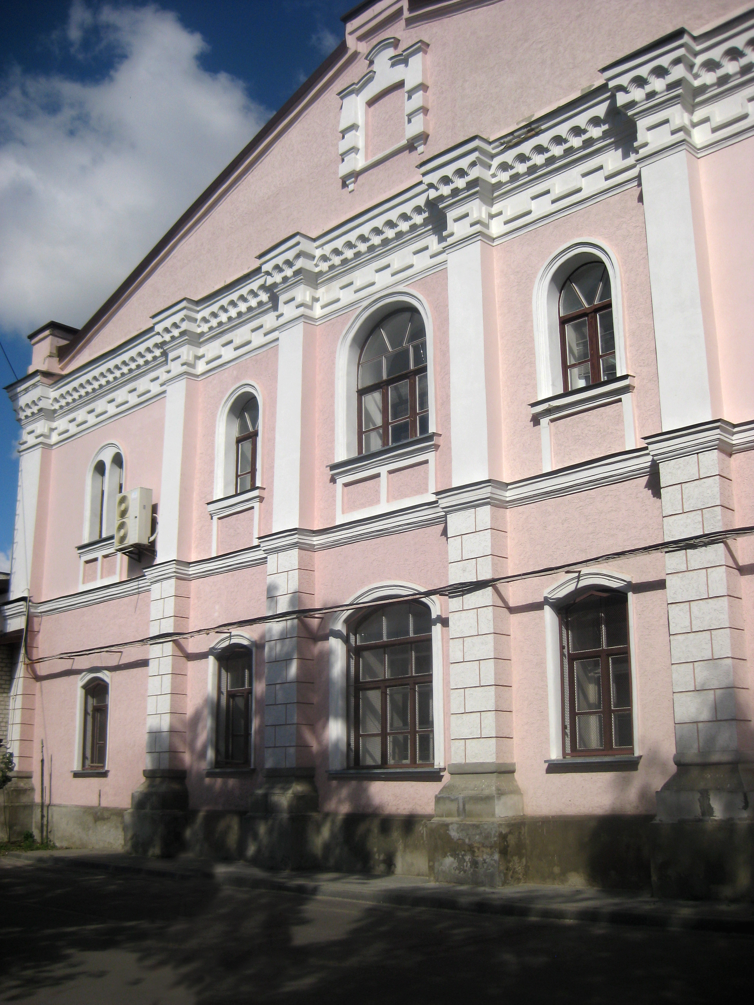 Синагога (мур.), Ковель, вул. Незалежності, 125